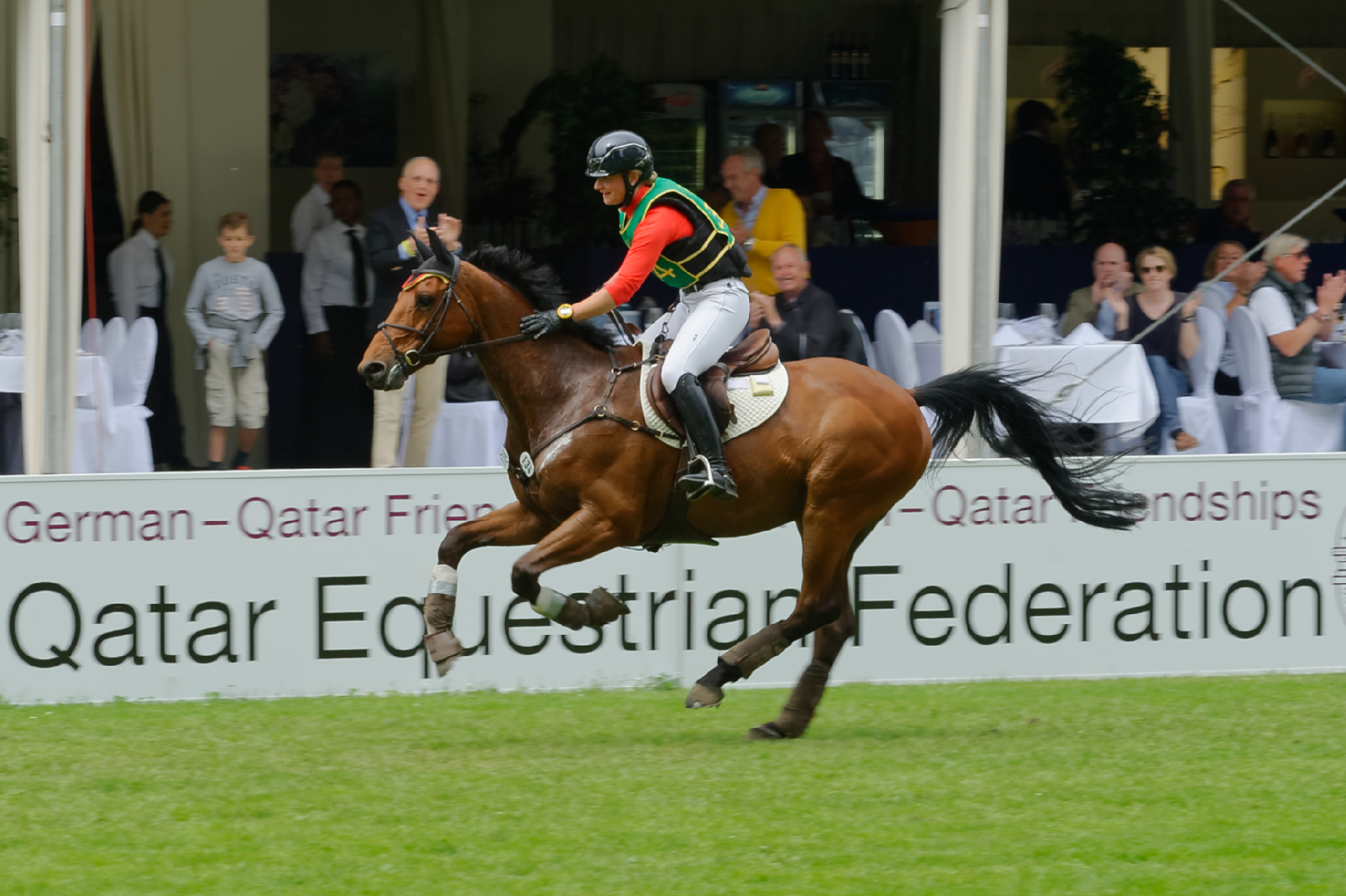 Wiesbaden, Julia Krajewski auf Samourai du Thot, Zieleinlauf Vielseitikeit